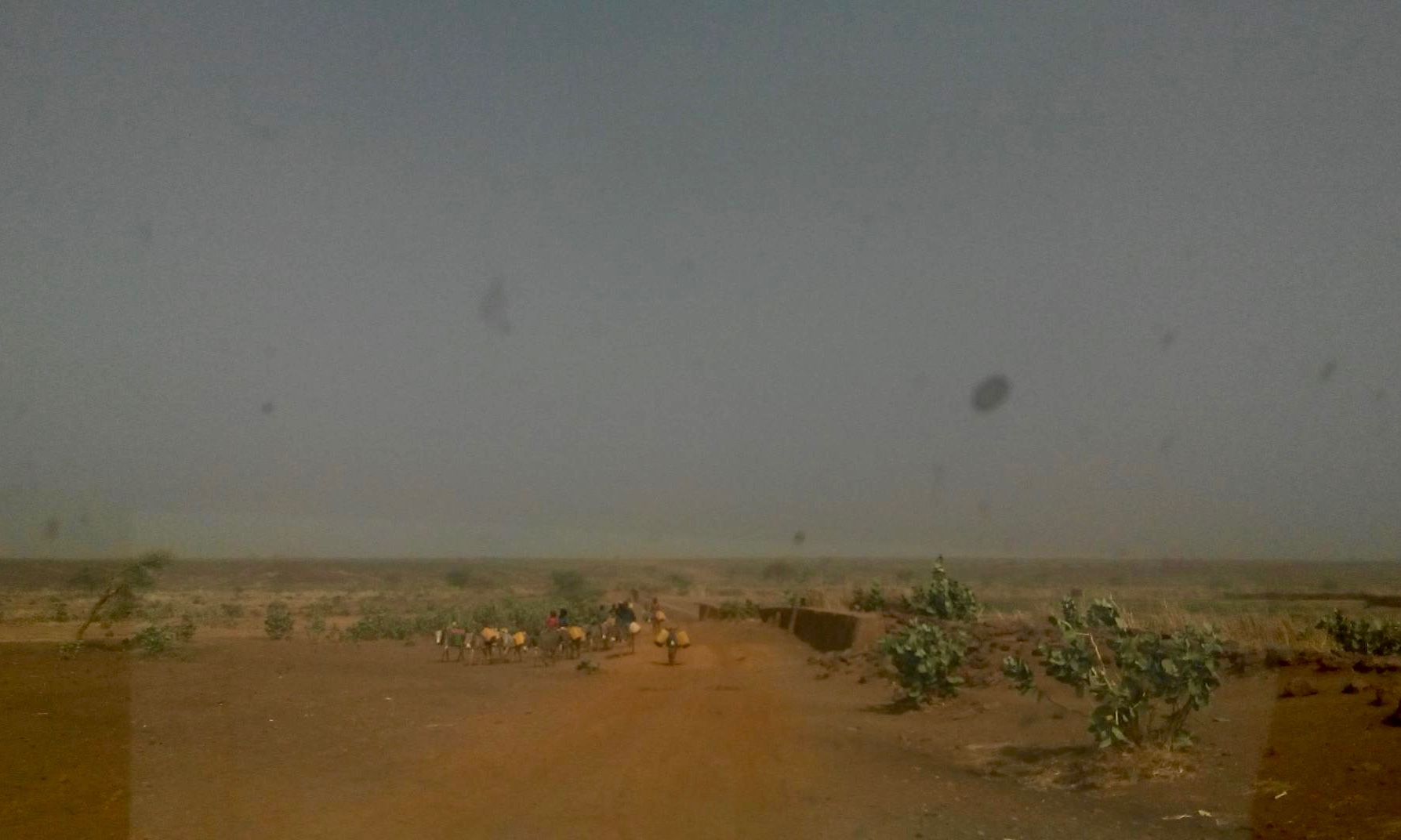 Straße von Tahoua nach Taza beim Dorf Nassam, Gemeinde Affala, Niger.